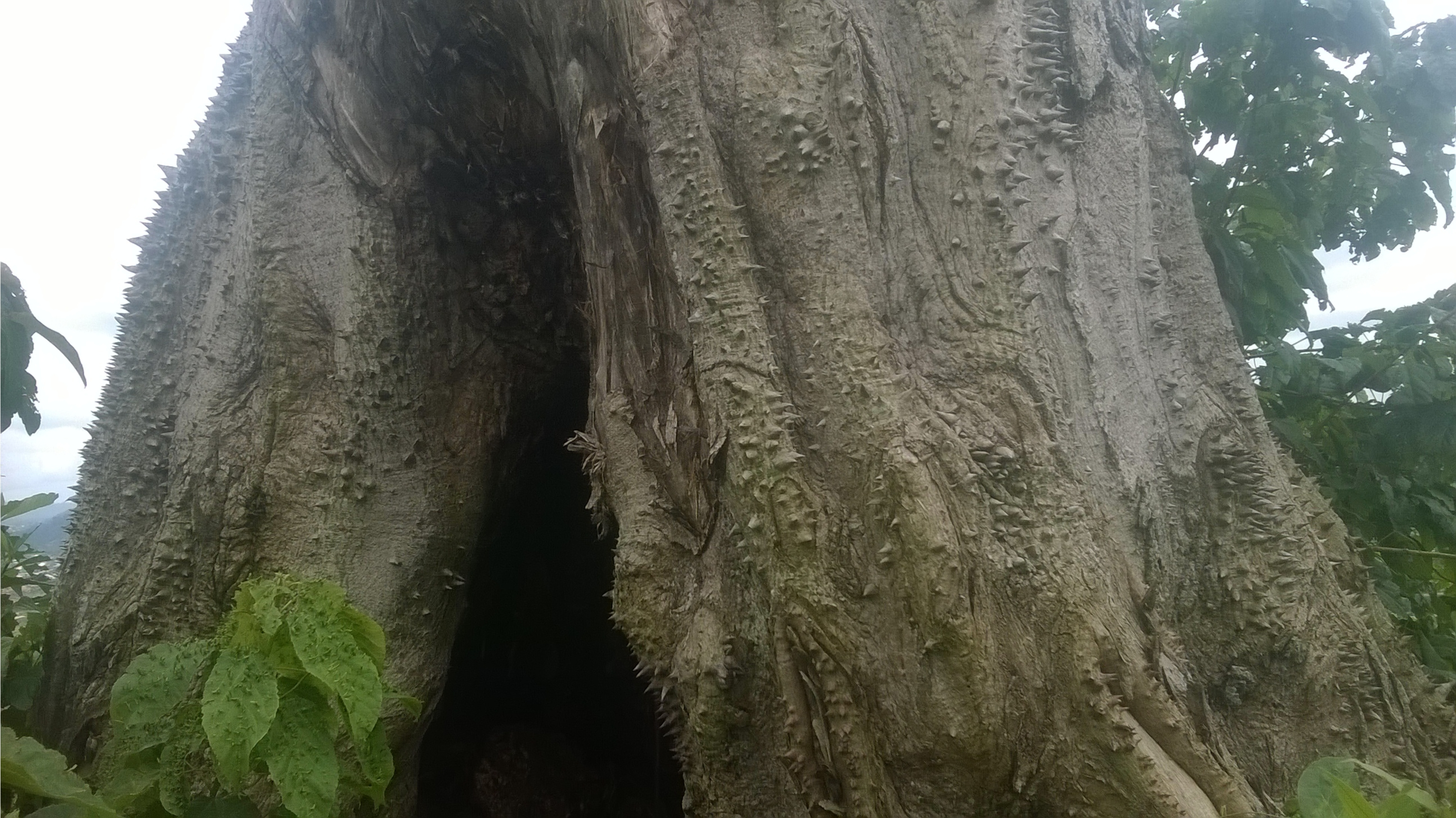 vue de la base d'un fromager dans les collines de mvog-beti